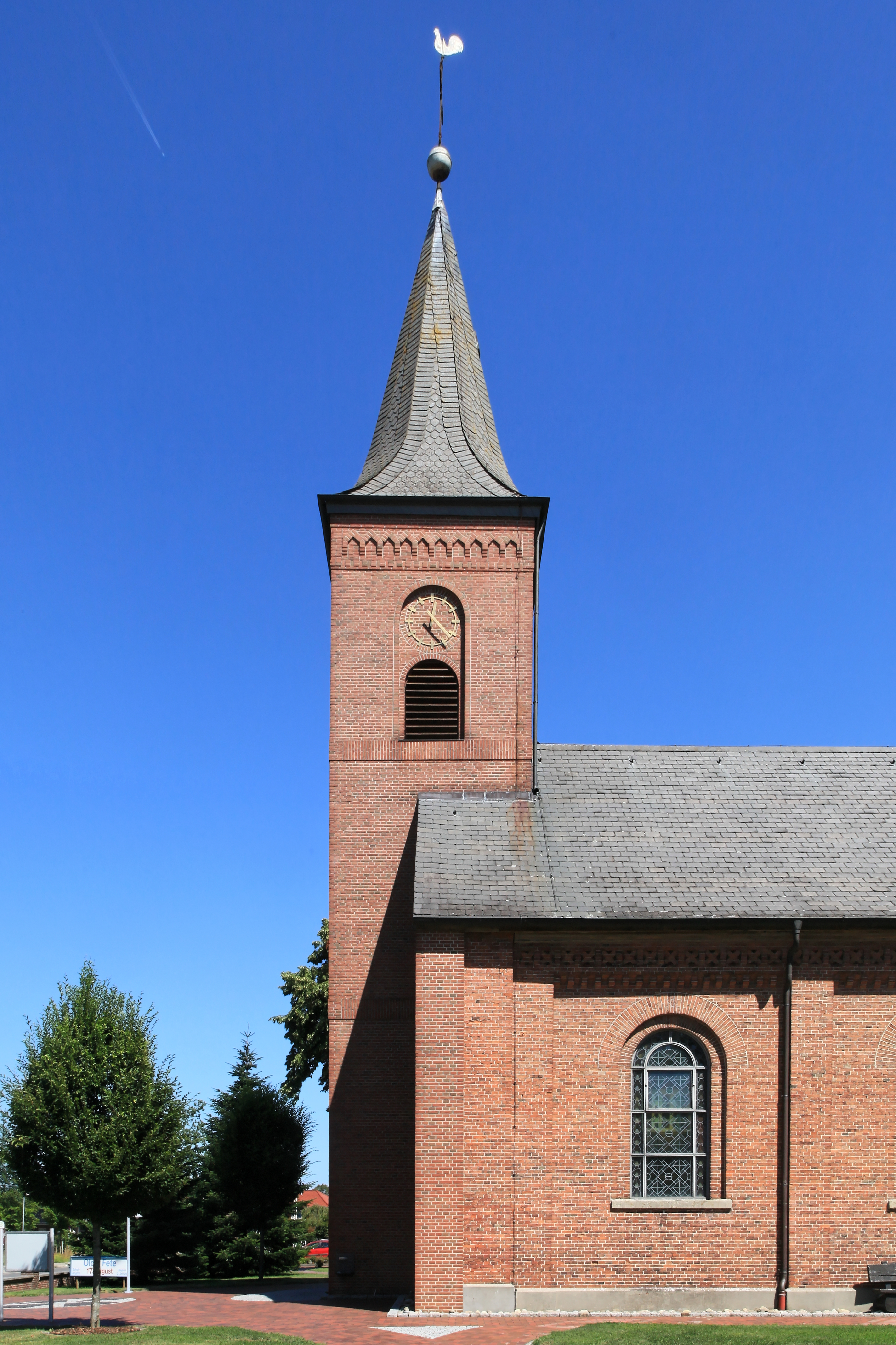 St. Bonifatius, Kirchstraße in Rhauderfehn